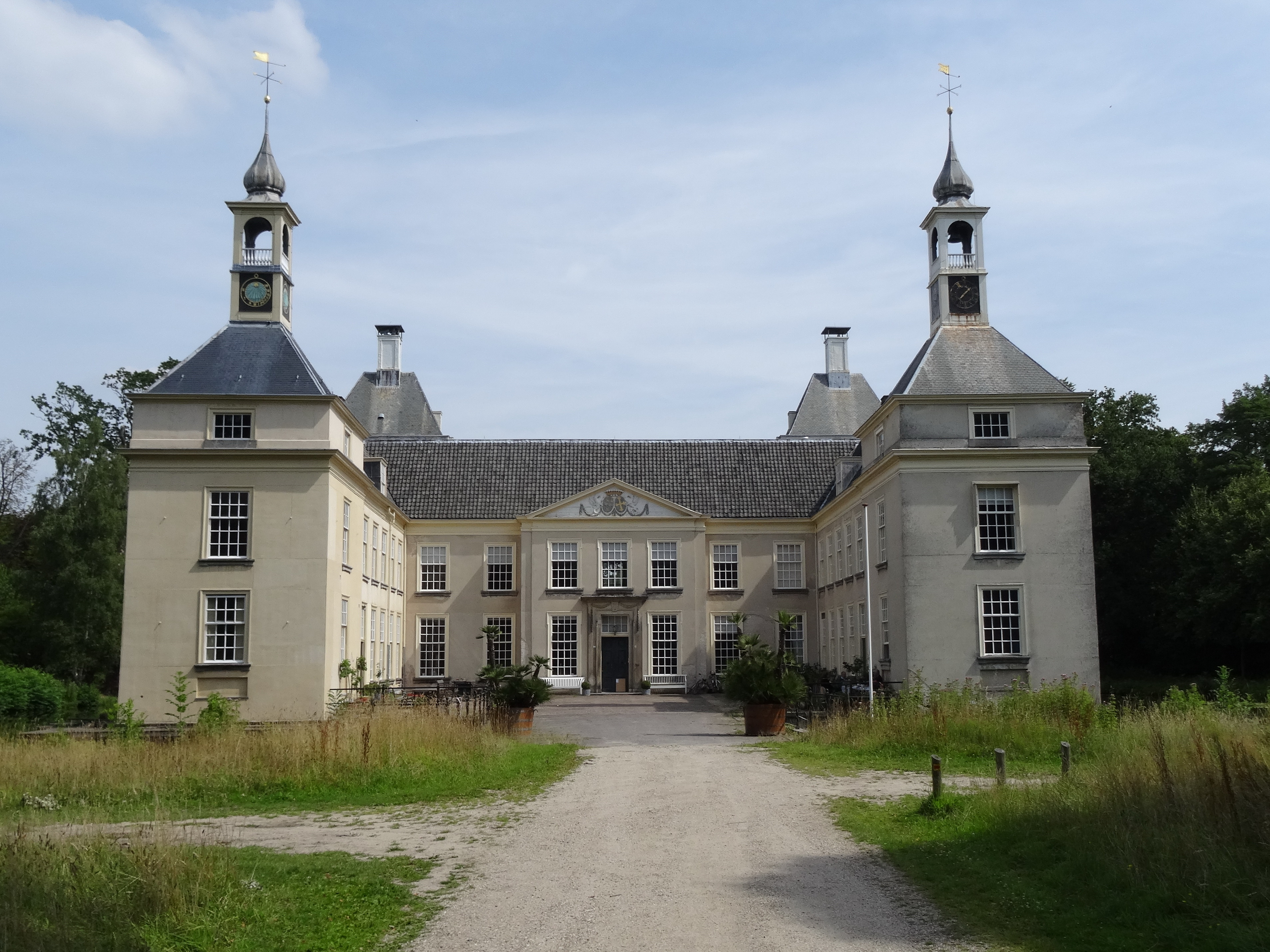 Kasteel Warmond voorzijde